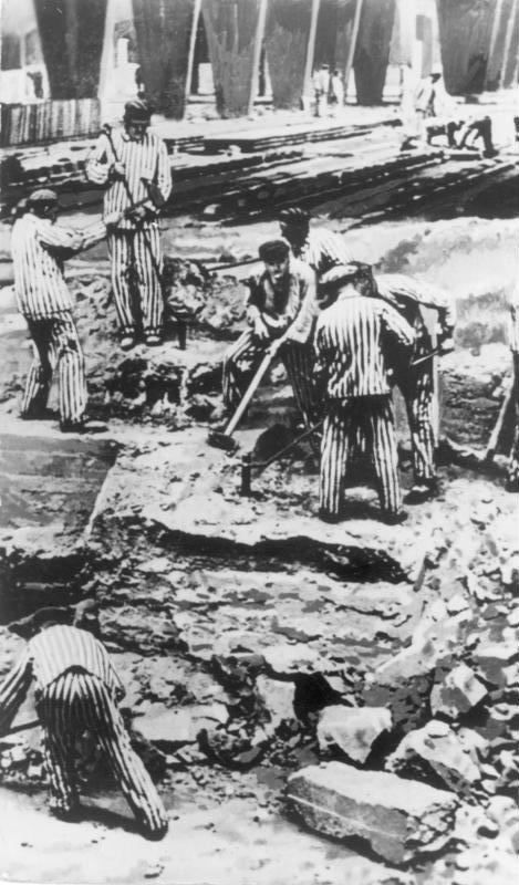 Zentralbild 9.12.1960 Zur Einweihung der Mahn- und Gedenkstätte Sachsenhausen am 23. April 1961. - Vor den Toren Berlins, auf dem Gelände des ehemaligen faschistischen Konzentrationslagers Sachsenhausen bei Oranienburg, in das von 1936 bis Kriegsende 200 000 Menschen verschleppt wurden, entsteht - wie in Buchenwald und Ravensbrück - eine würdige Mahn- und Gedenkstätte. Jeder Quadratmeter Boden ist hier vom Blut der 100 000 Toten durchtränkt, die im KZ Sachsenhausen mit seinen 73 Aussenkommandos erschlagen, erhängt, erschossen, zu Tode geprügelt, durch erbarmunslose Sklavenarbeit zu Grunde gerichtet und vergast wurden. Doch gelang es den SS-Mördern nicht, den Widerstandswillen der politischen Häftlinge zu brechen. So wurde Sachsenhausen auch zur Stätte der großen internationalen Solidarität und des mutigen Kampfes gegen Faschismus und Krieg. UBz: Das Klinkerwerk, das mörderischste Arbeitskommando. Zuerst brannte man Klinkersteine, aber dann wurden in den riesigen Hallen Granaten gedreht und anderes Kriegsmaterial prduziert.